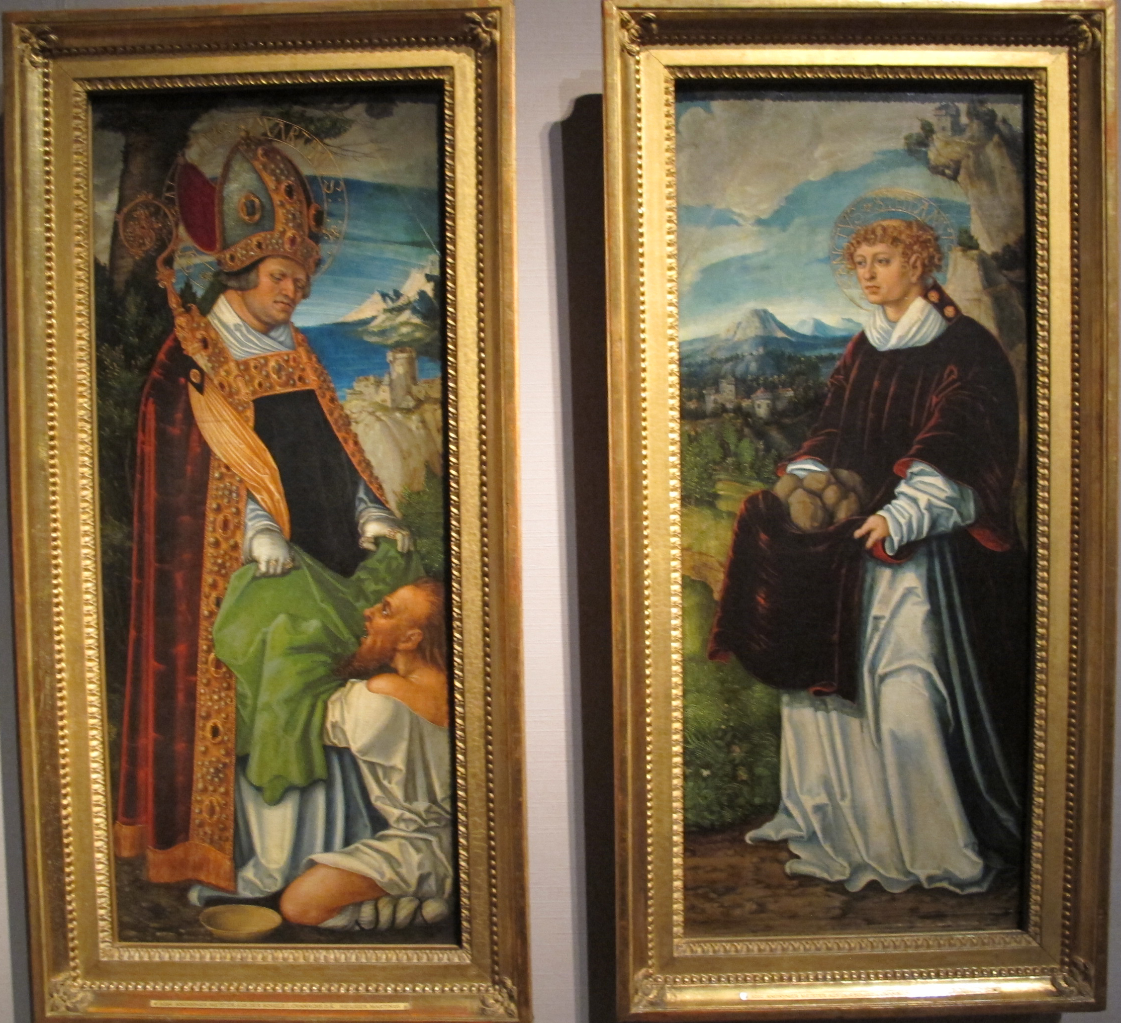 Cranach il vecchio, altare pfirtscher 01, 1526–1530 ca, aschaffenburg, staatsgalerie